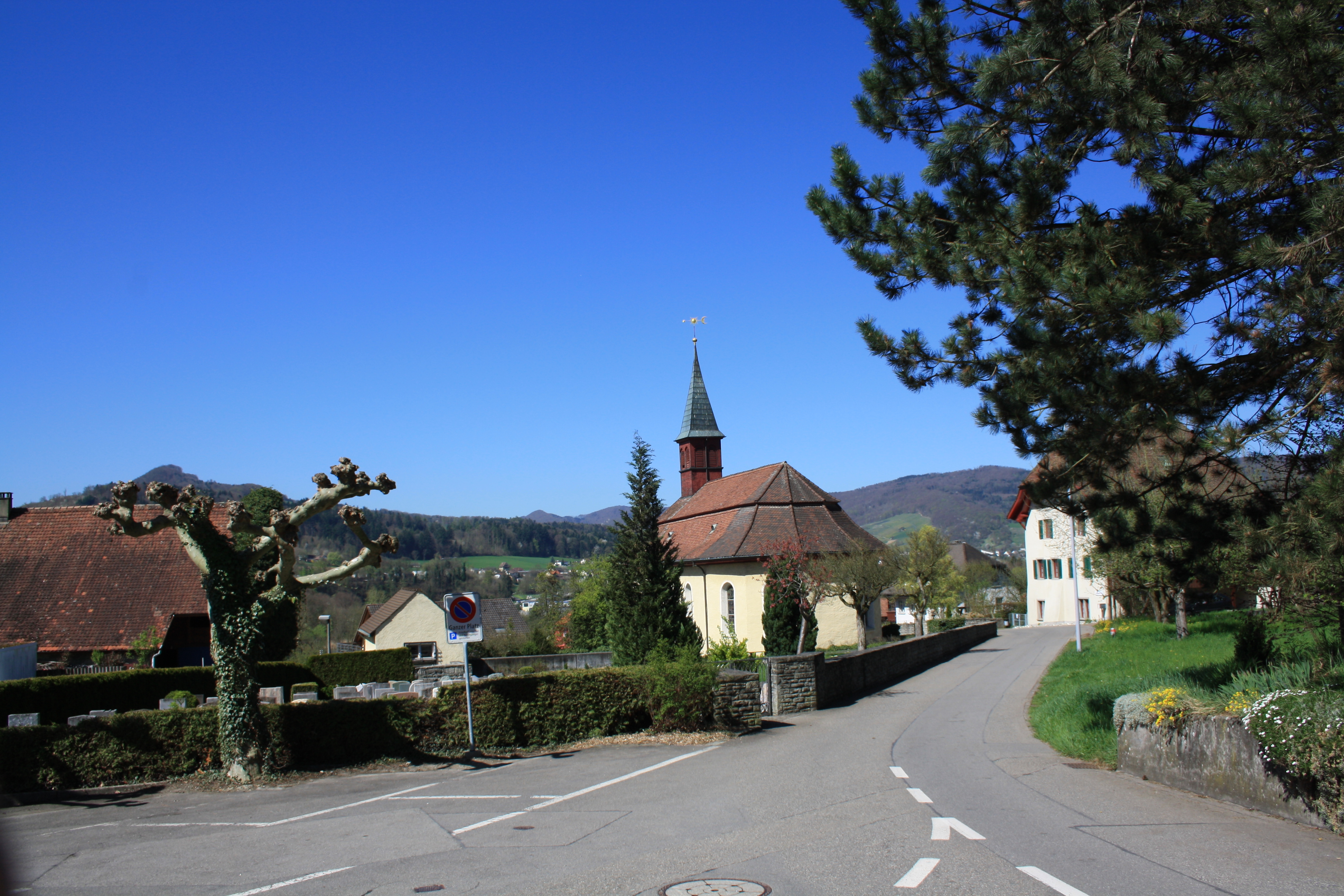 Holderbank